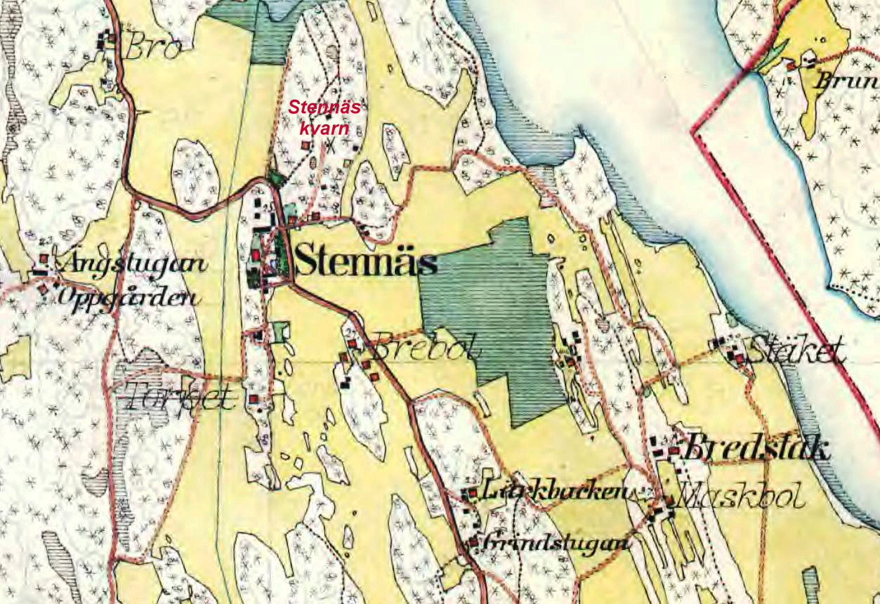 Del av häradsekonomiska karten visande Stennäs gård och kvarn